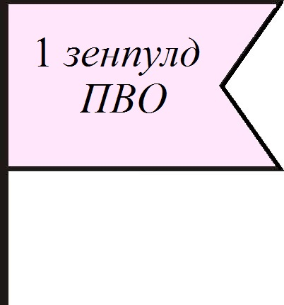 Знак зенитной пулеметной дивизии ПВО на оперативно-тактическую карту